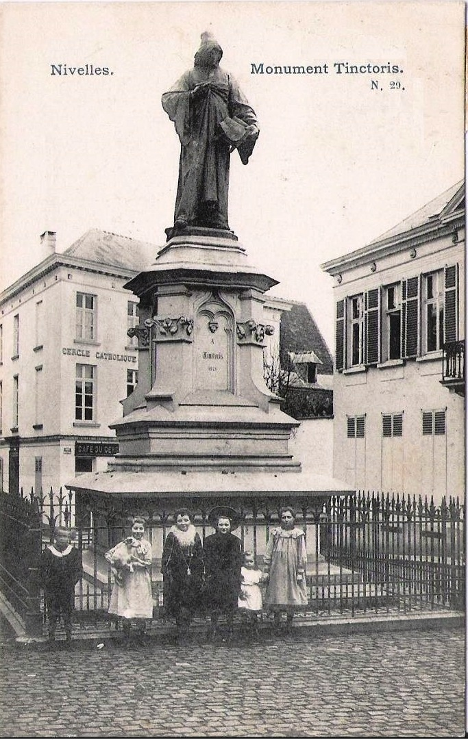 Statue de Johanness Tinctoris (né vers 1435 à Braine-l'Alleud, décédé en 1511) érigée à Nivelles en Brabant Wallon (Belgique). Photo vers 1906.